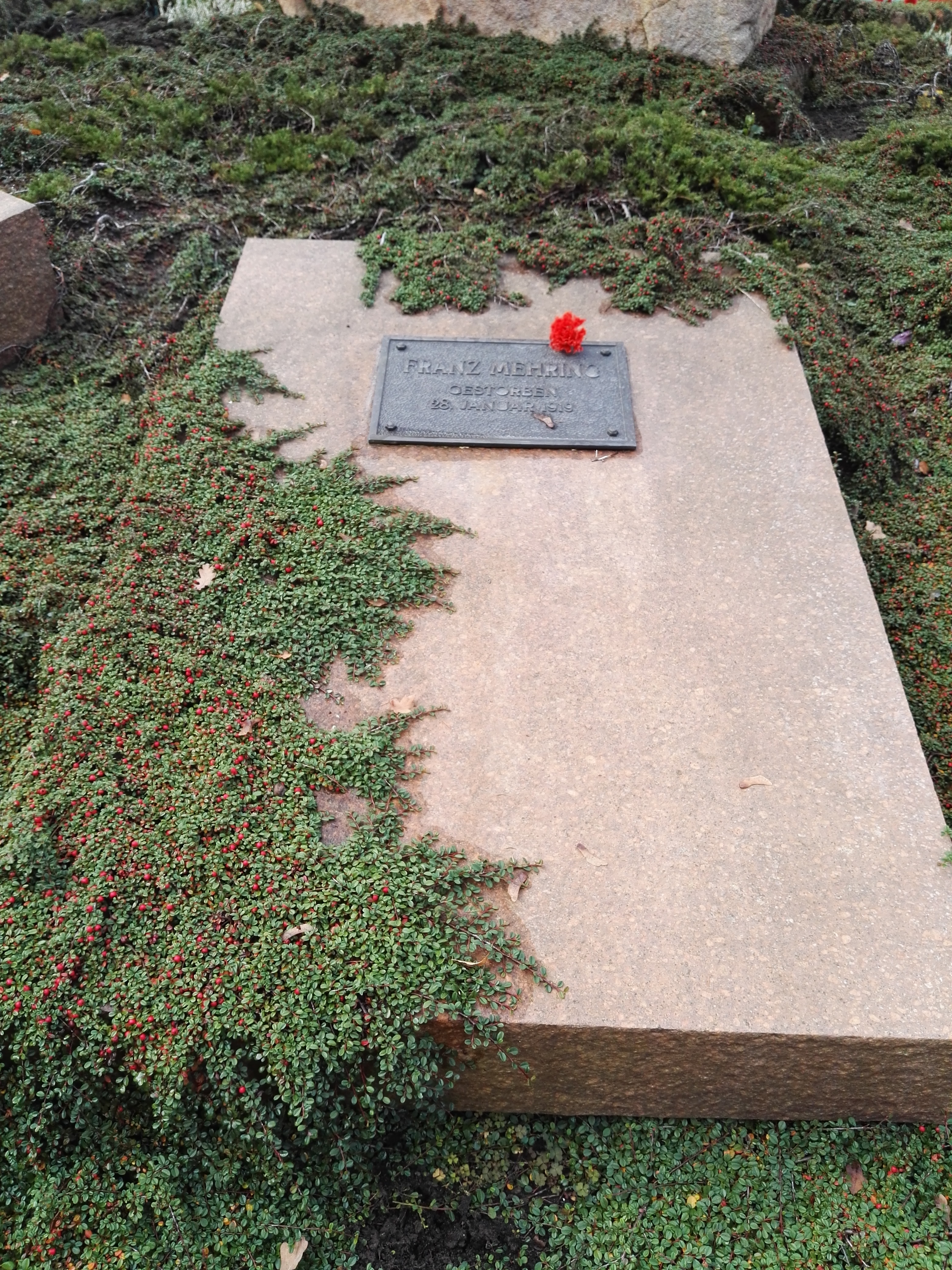 Grab von Franz Mehring in der Gedenkstätte der Sozialisten auf dem Zentralfriedhof Friedrichsfelde in Berlin-Lichtenberg